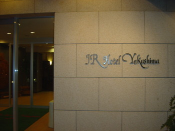 正面入り口